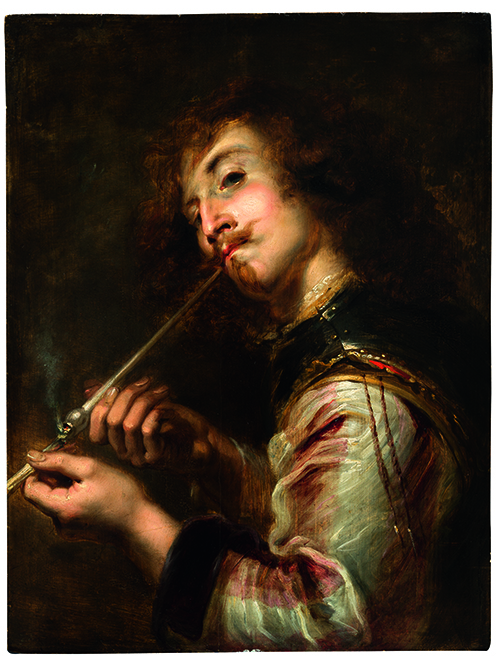 Jan Cossiers, Jonge man die zijn pijp aansteekt / allegorie van de reuk, ?, olieverf op paneel, 64 x 48,5 c 3,5 cm.